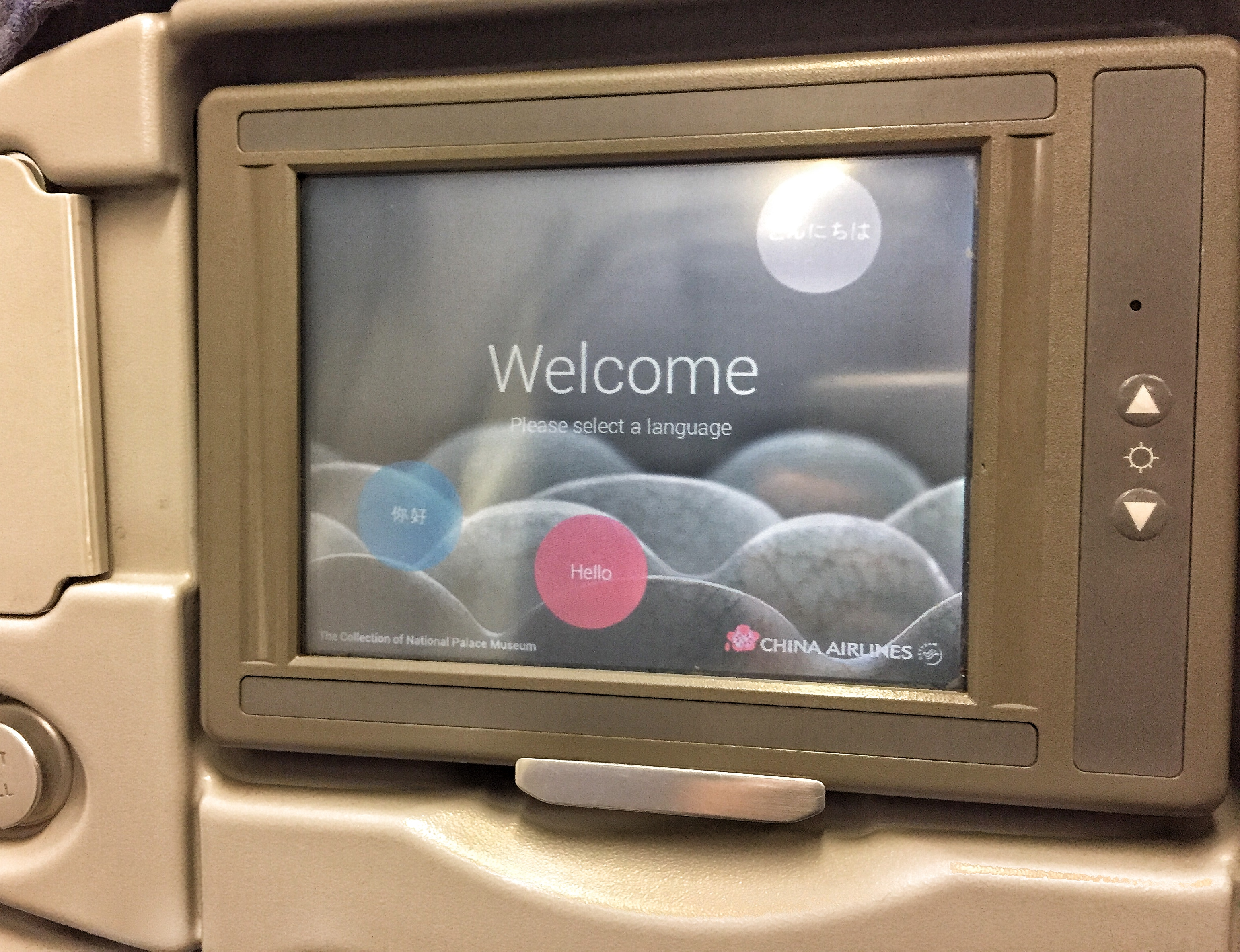 中華航空機上娛樂系統 「繽紛世界」 A330-300